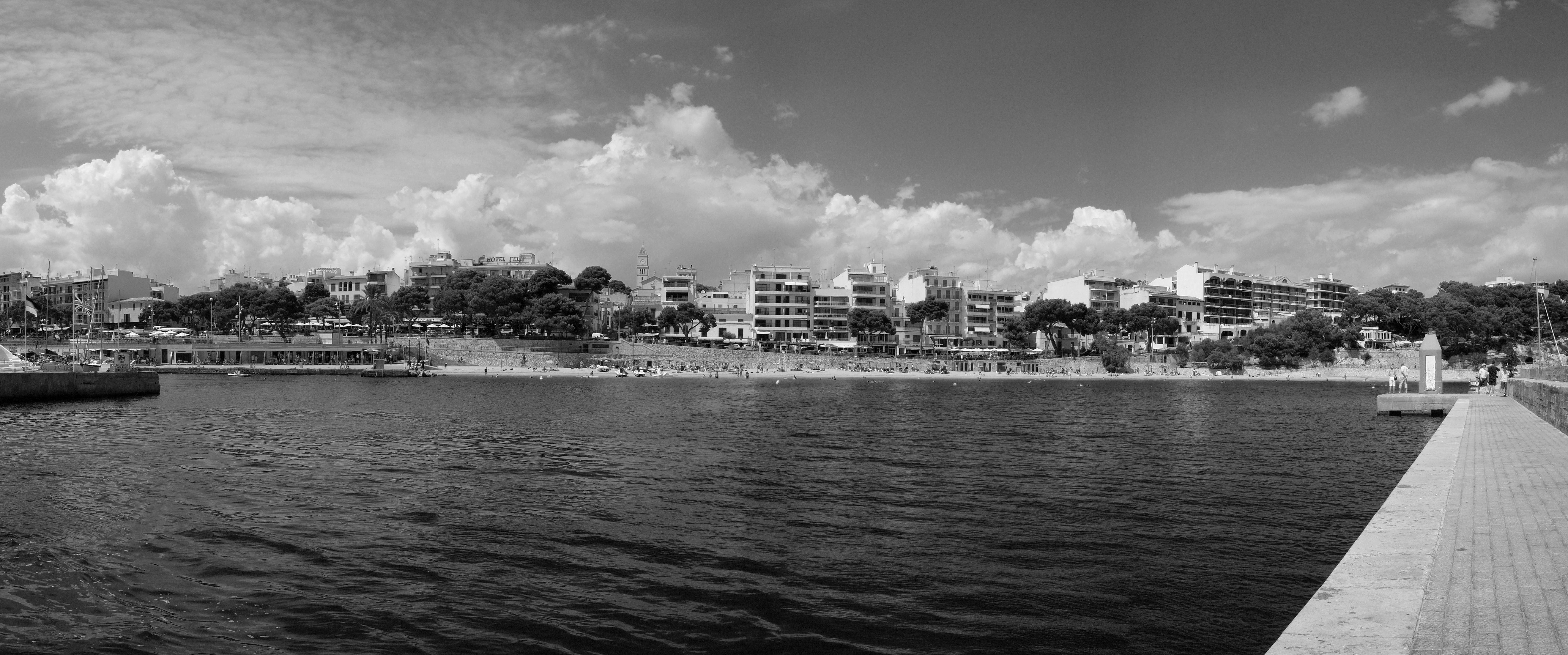 Platja de Porto Cristo (Mallorca), estiu de 2006